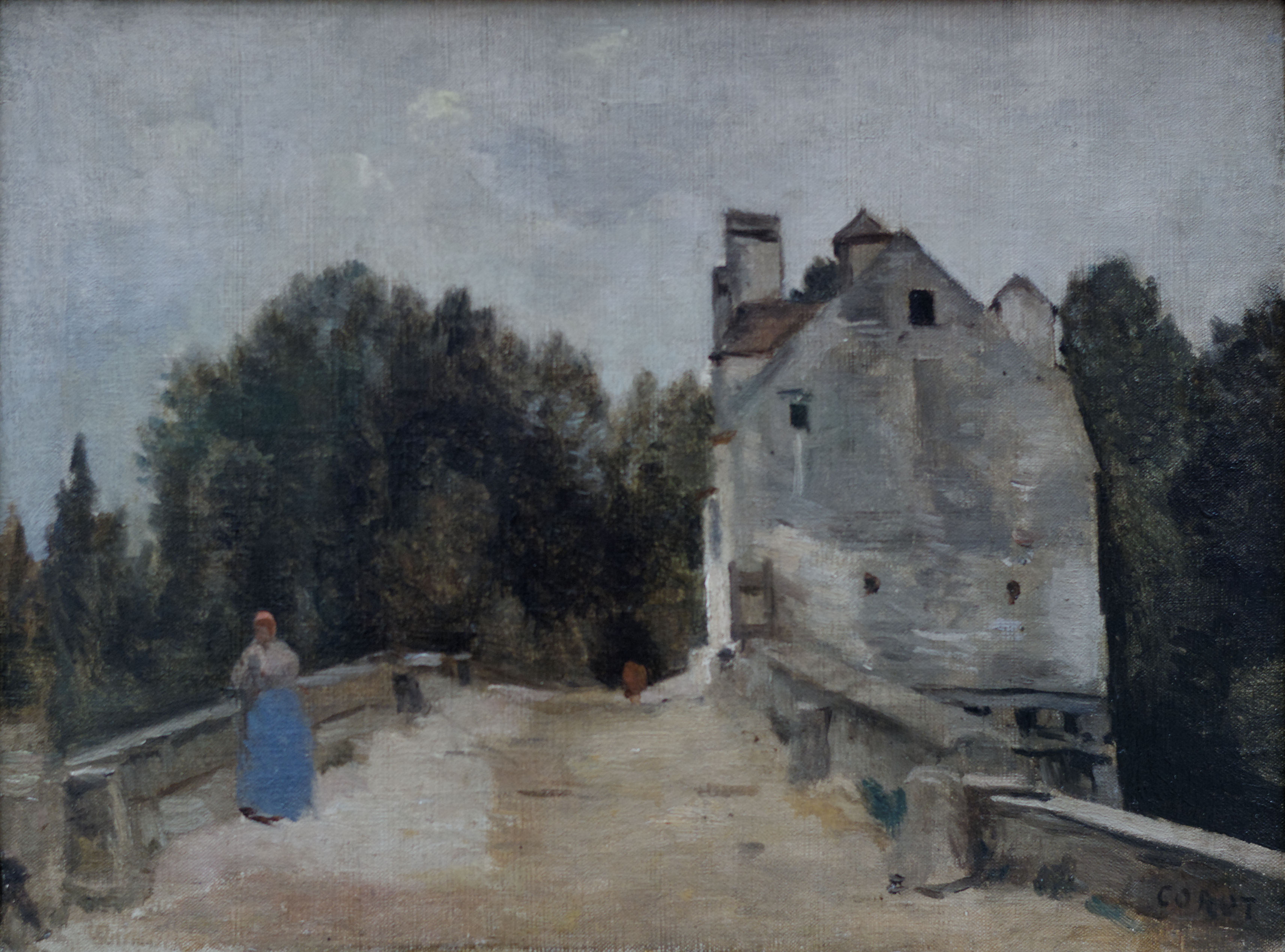 Bridge and Mill near Manteslabel QS:Lde,"Brücke und Mühle bei Mantes"label QS:Len,"Bridge and Mill near Mantes"label QS:Lfr,"Pont et moulin de la région de Mantes."